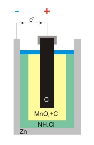 battery zinc chloride